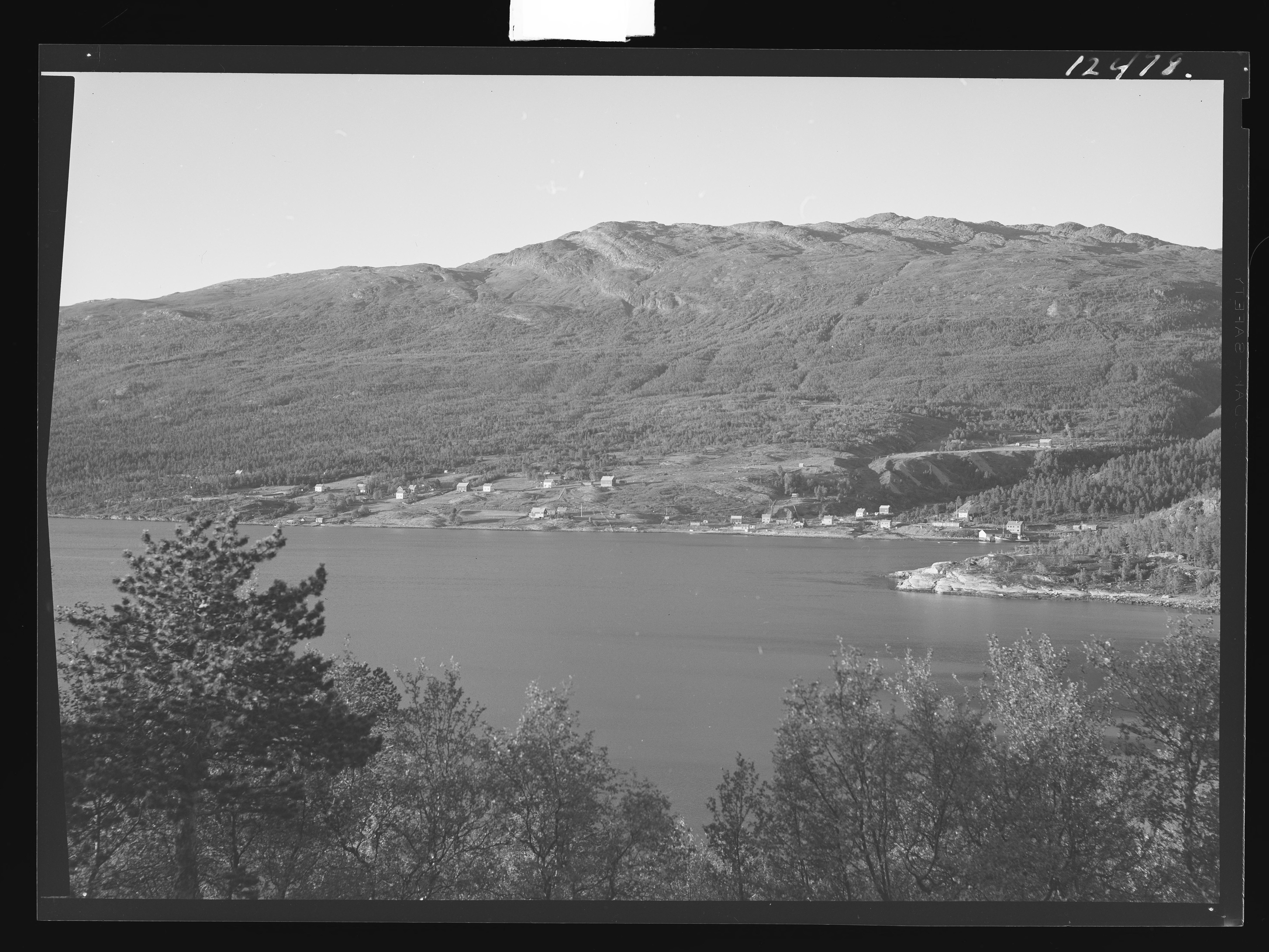 Bildet er hentet fra Nasjonalbibliotekets bildesamling. Anmerkninger til bildet var: Fotograf:Ukjent Badderen,Badderfjorden, Kvænangen, Troms